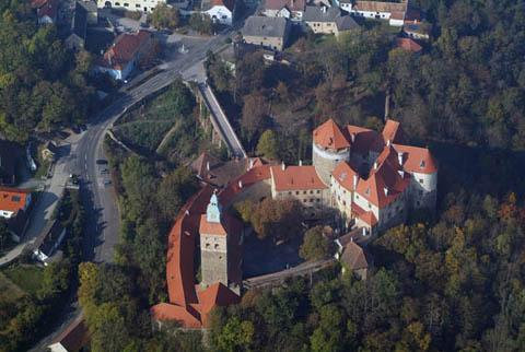 Stadtschlaining, Austria, aerialphotography